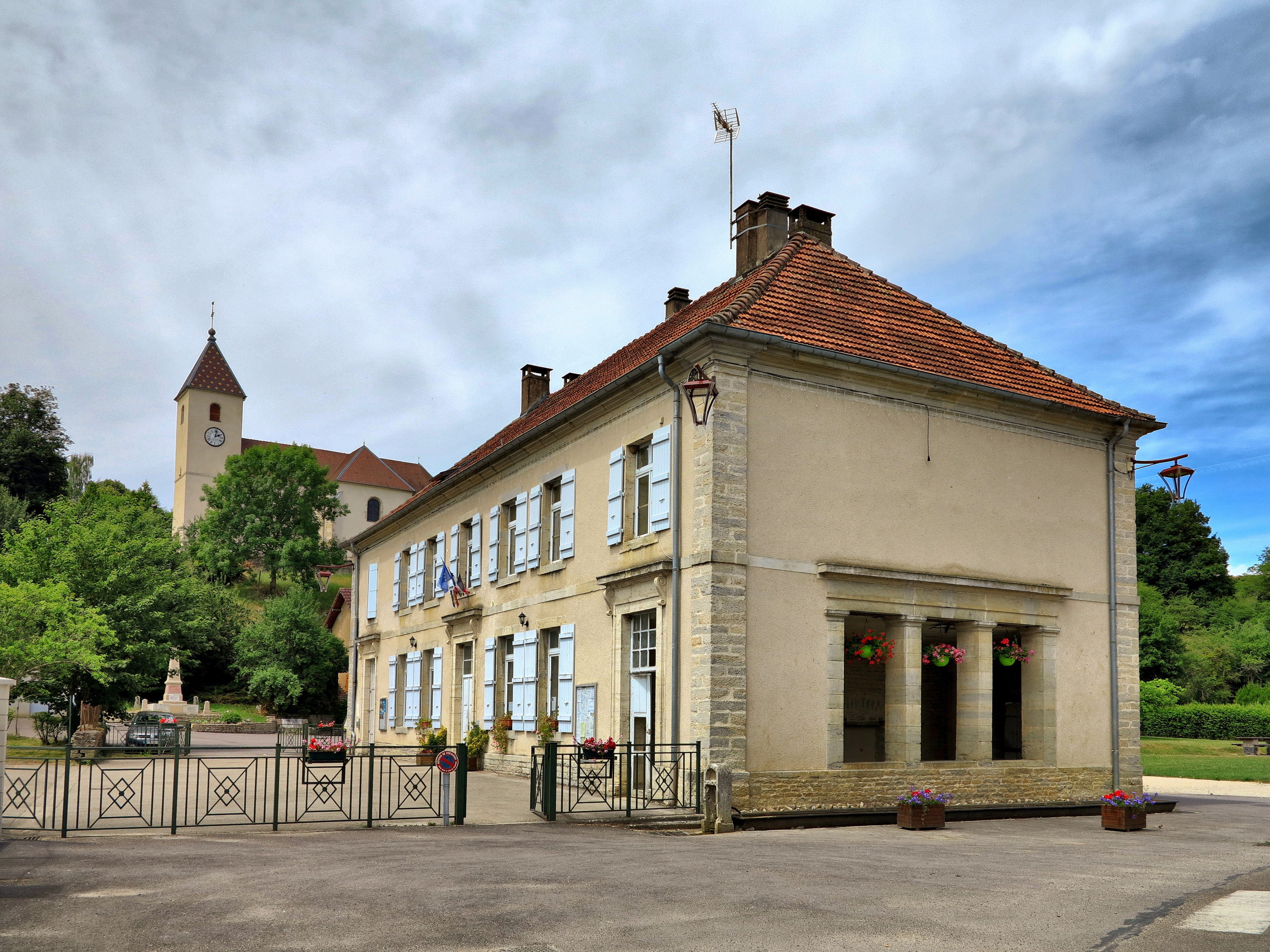 La mairie-lavoir et l'église